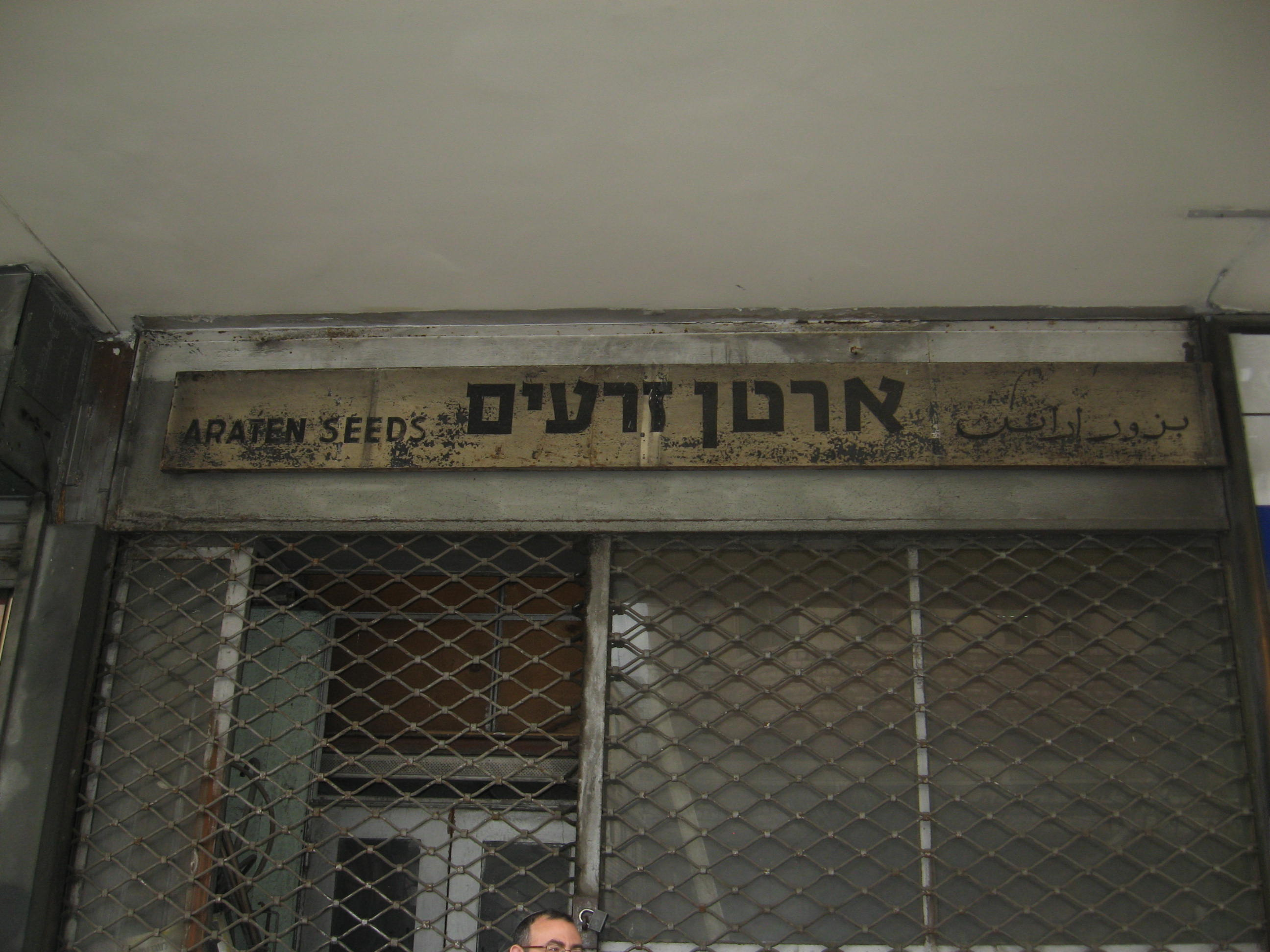 חנות הזרעים של ארטן ברחוב העצמאות בחיפה